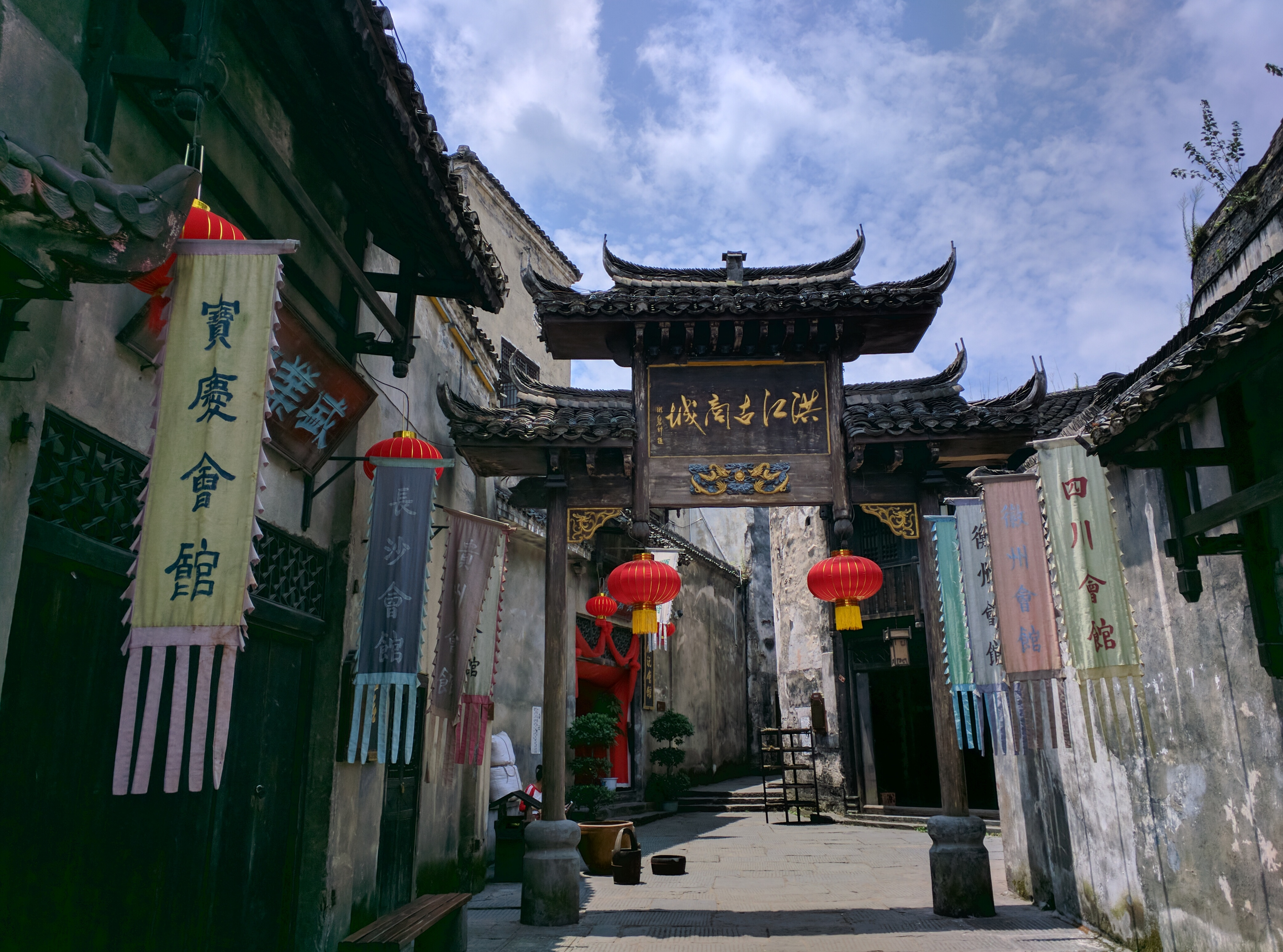 中文（中国大陆）: 洪江古商城正门